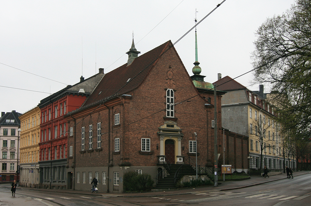 Vestre frikirke, Pilestredet 69, Oslo. Reist 1920; arkitekt Harald Aars og Lorentz Ree.